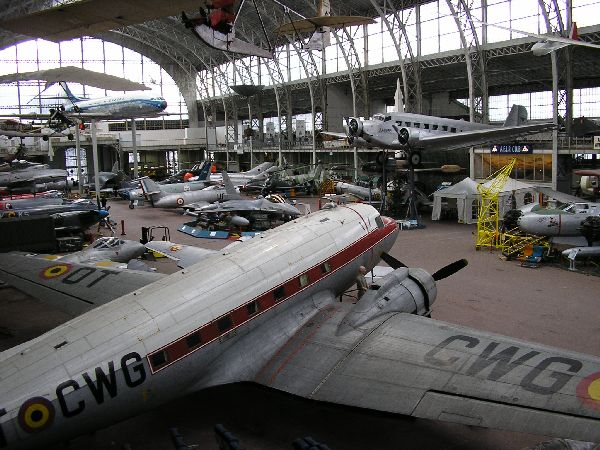 Vue generale Musée Royal de l'Armée et de l'Histoire Militaire, Bruxelles